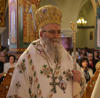 Ο Σεβασμιώτατος Μητροπολίτης Προικοννήσου κ. Ιωσήφ